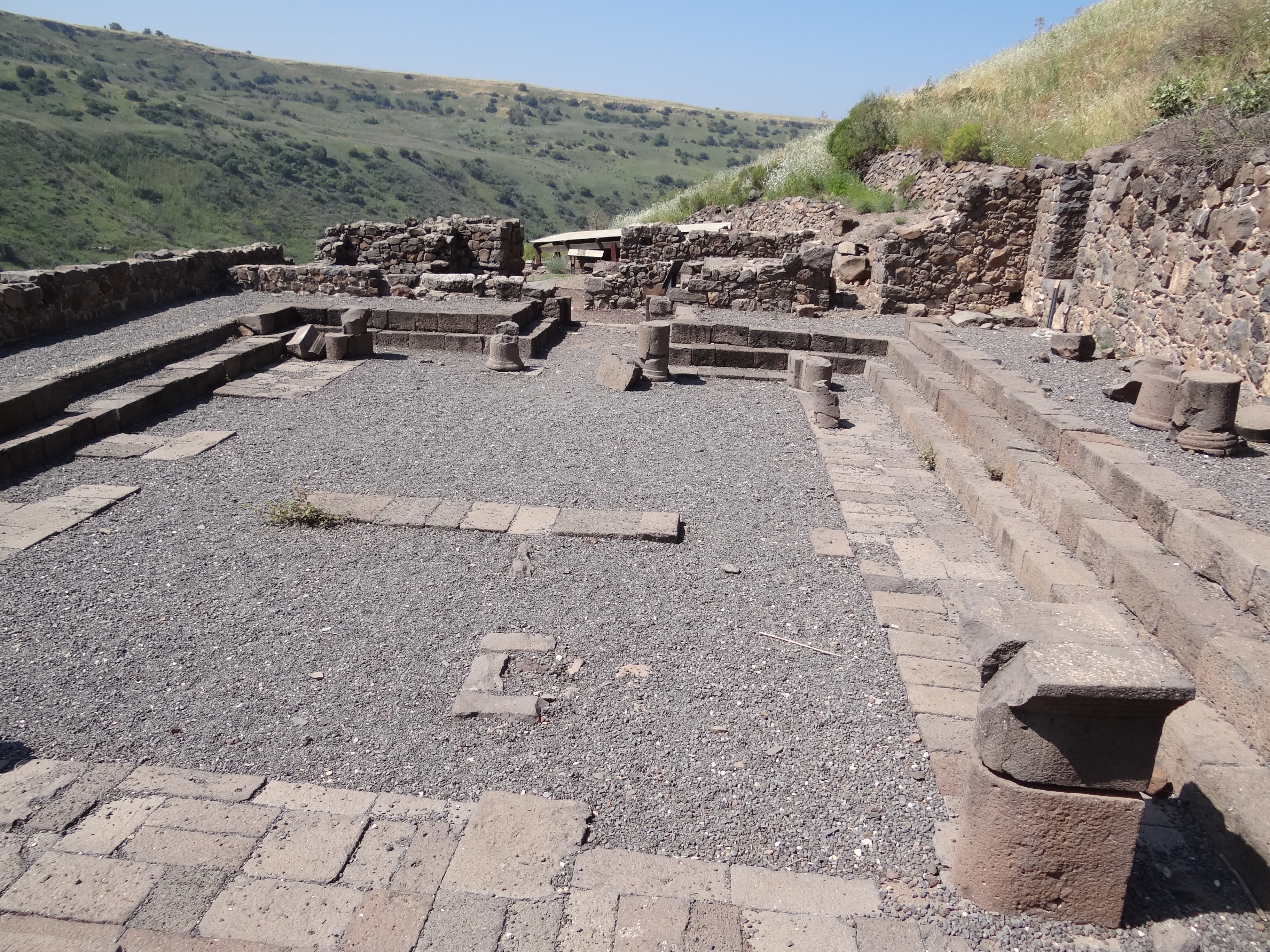 Gamla Synagogue in Golan Heightsת Built during the second Temple Period in the first century CE. This is the one of the most ancient synagogues in Israel בית הכנסת בגמלא, שמקורו כנראה בתקופה ההרודיאנית. זהו ממצא ייחודי שכן היה זה בית הכנסת הראשון מהתקופה ההרודיאנית .